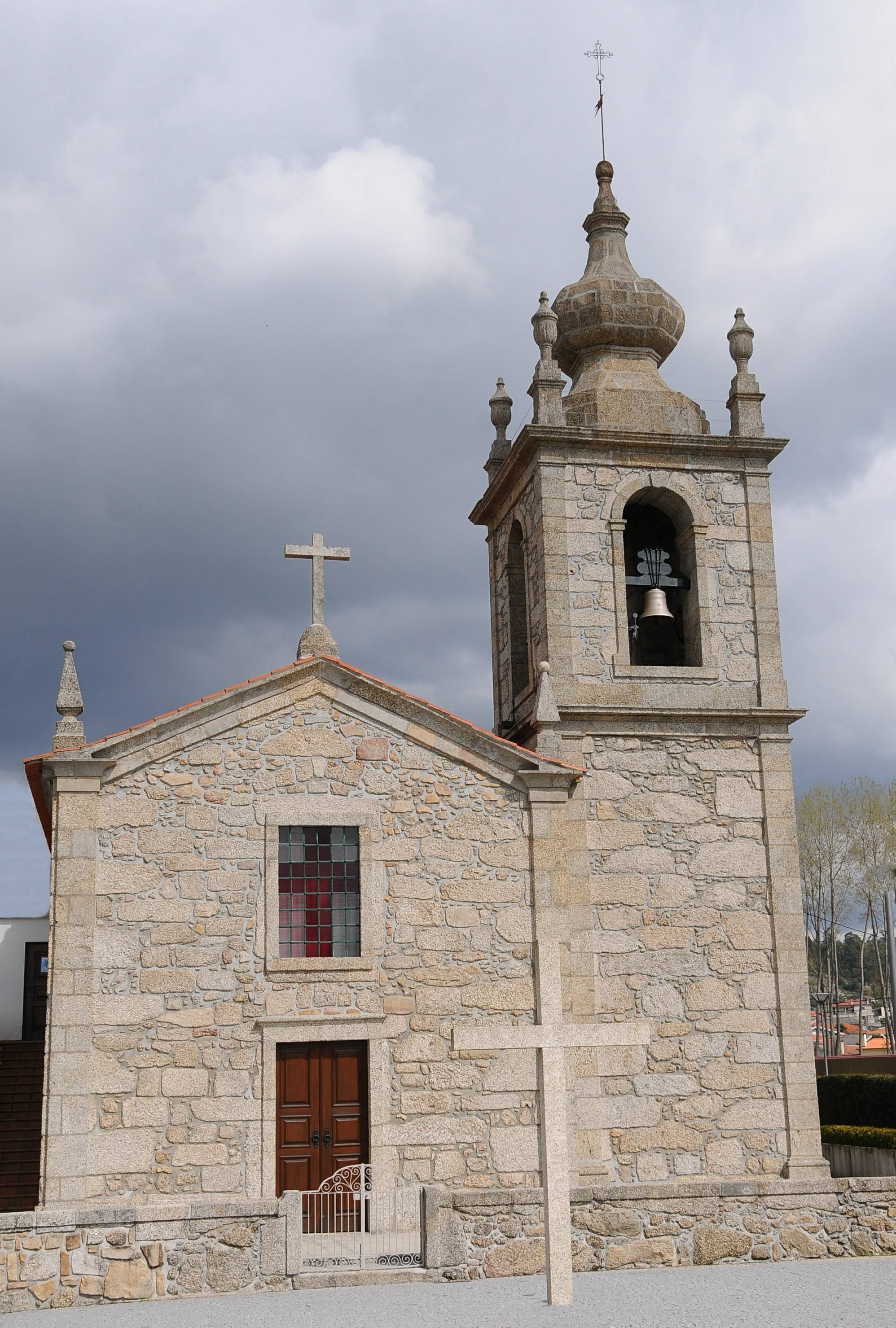 Celeiros Church, in Braga, Portugal